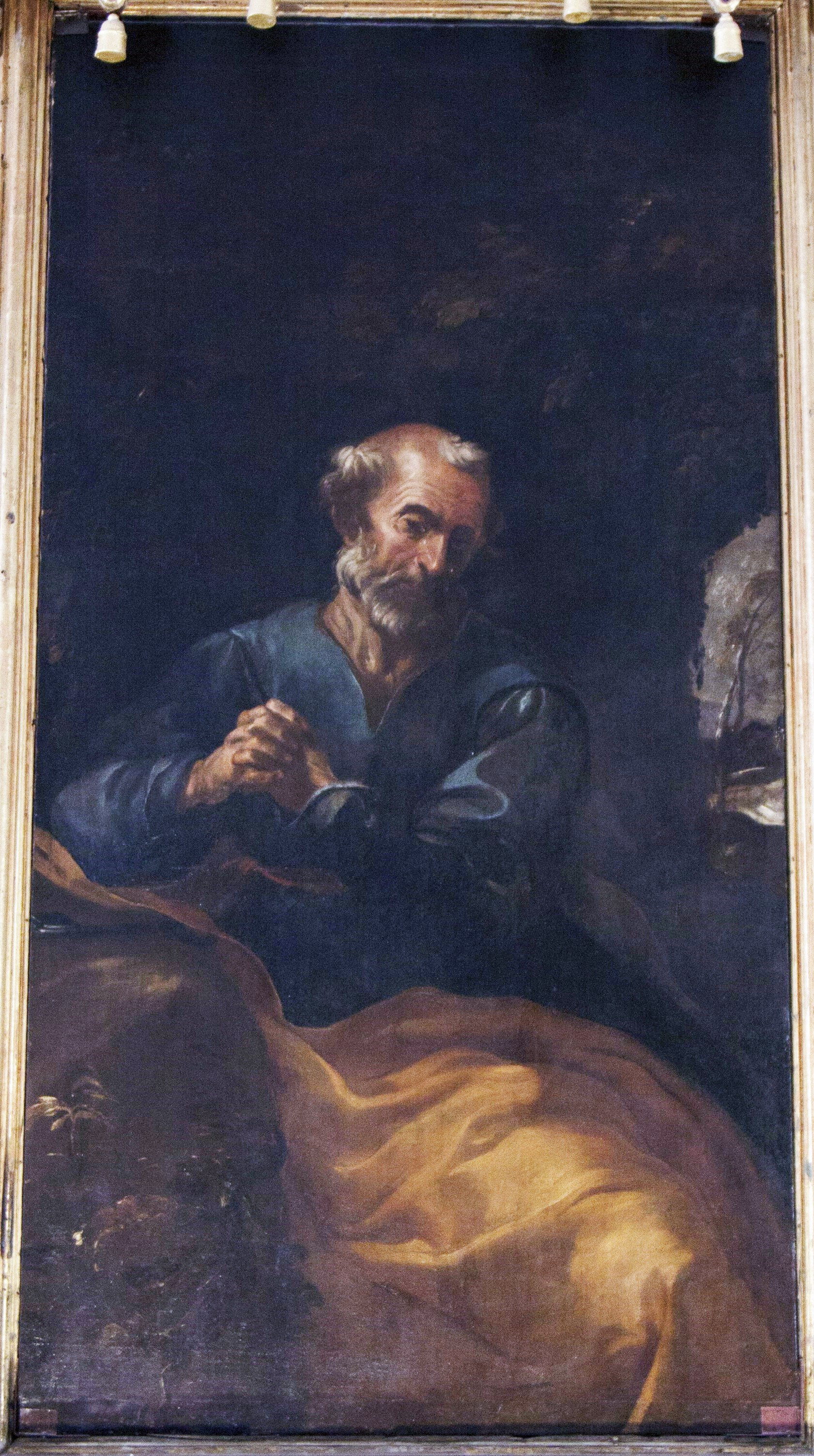 Las lágrimas de San Pedro, Iglesia de San Francisco, Évora (Portugal), antigua Sala del Capítulo (hoy Capilla del Señor de los Pasos). Entre 1627-1637.